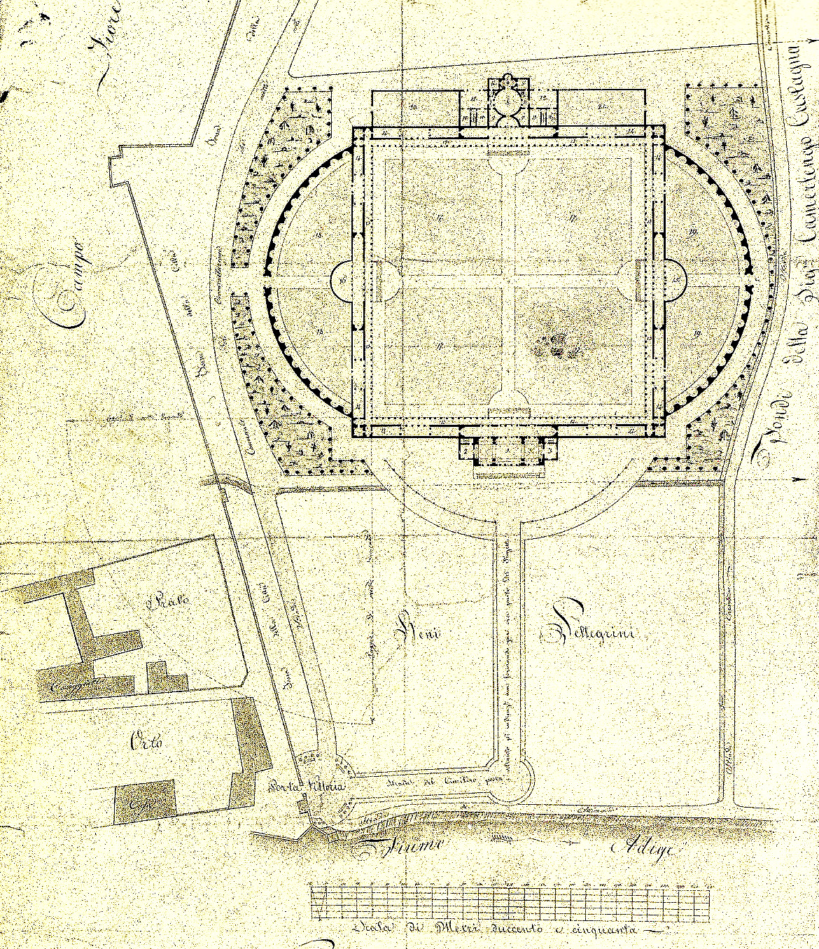 Mappa del progetto del Cimitero Monumentale di Verona di Giuseppe Barbieri